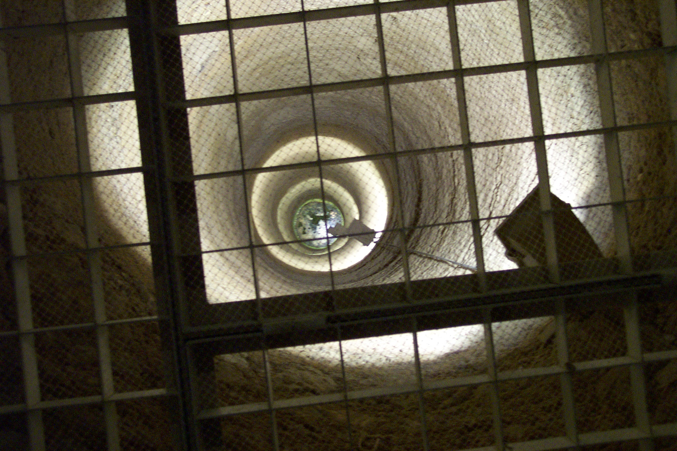 Dolmen of Menga, Antequera, Spain.